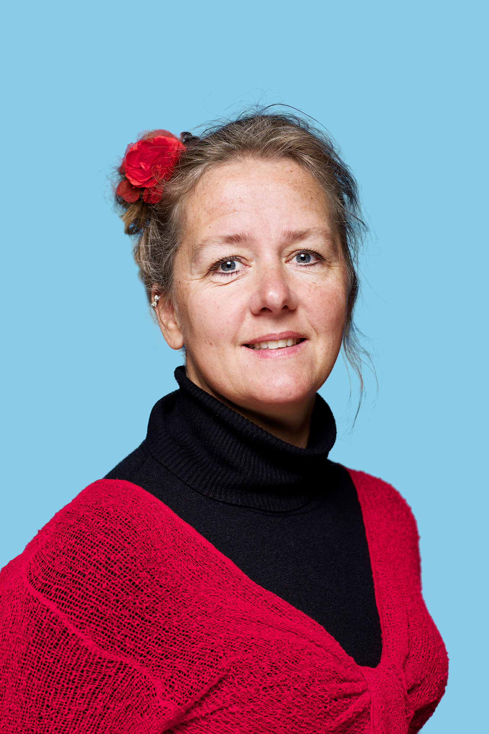 18 januari 2015. Kandidaat voor de Eerste Kamer. Op pvda.nl de volledige kandidatenlijst: bit.ly/1zpNRIG. Foto Lex Draijer.